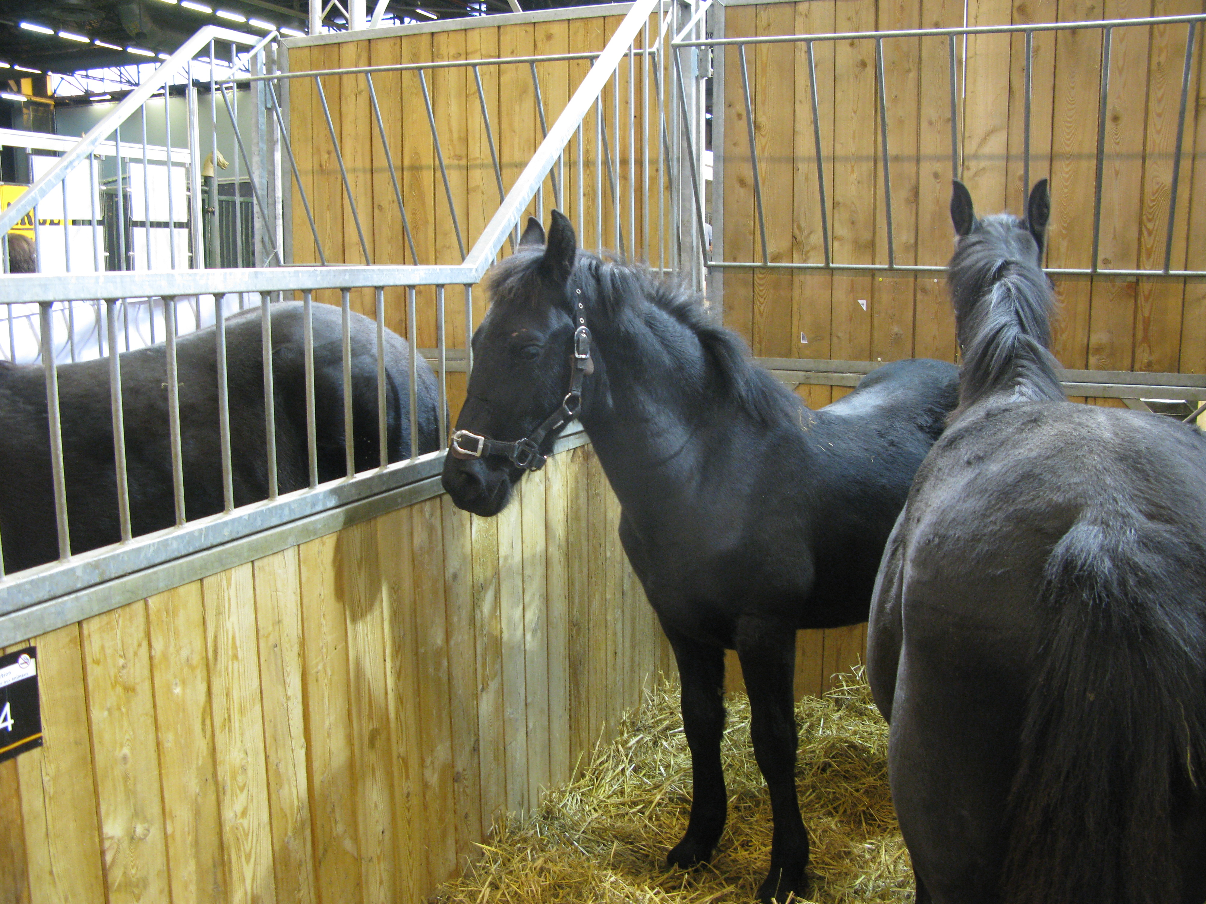 Pouliche et jument (equus ferus caballus) de race Arabo-frison, au salon du cheval de Paris, à Villepinte.